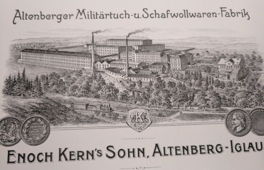 Foto einer Postkarte vom Jahr 1900. Sie stellt die Militärtuch- und Schafwollwaren-Fabrik in Altenberg bei Iglau dar.